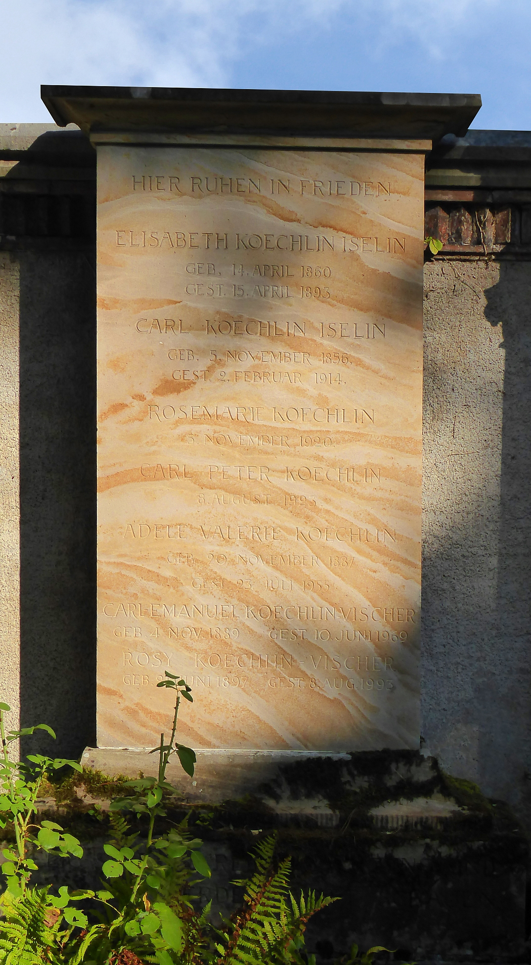 Carl Koechlin-Iselin, Grabstätte auf dem Friedhof Wolfgottesacker, Basel